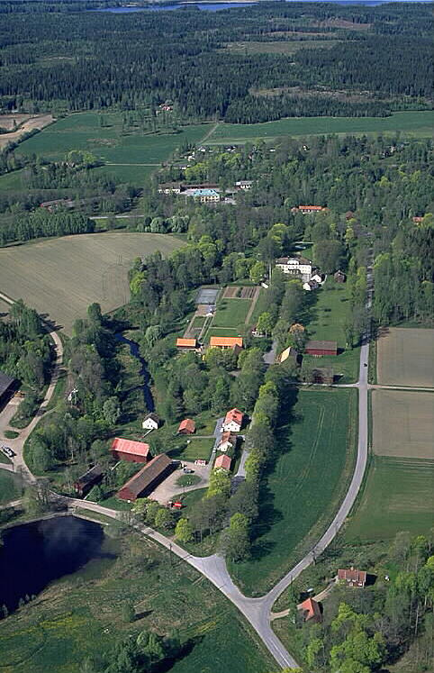 Skyllbergs bruk och herrgård. Motiv: Skyllbergs bruk Nyckelord: Flygbilder, Riksintressen Kategori: Bruksherrgård, BruksmiljöSkyllbergs bruk och herrgård.